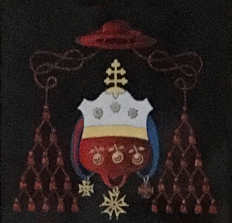 Arma del cardinale Pier Francesco Meglia